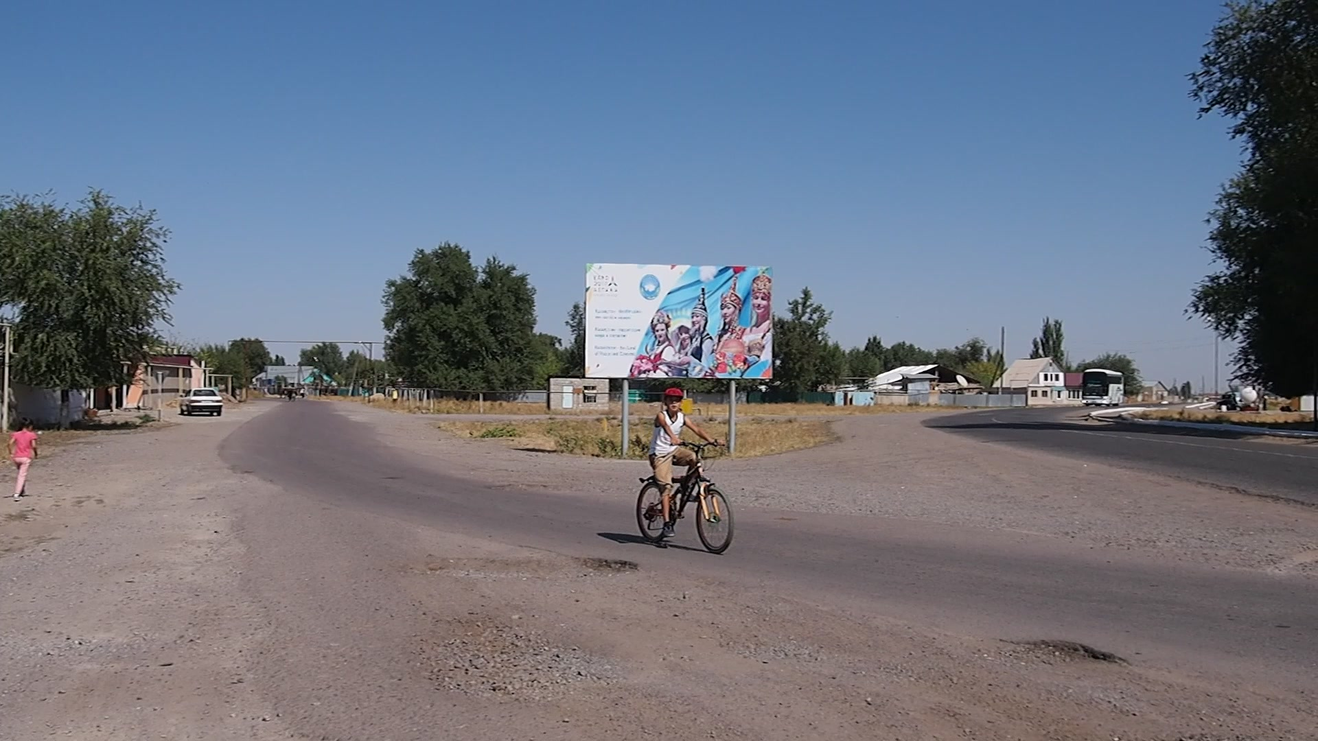 Lugowoi, Kasachstan, nördlich des Bahnübergangs